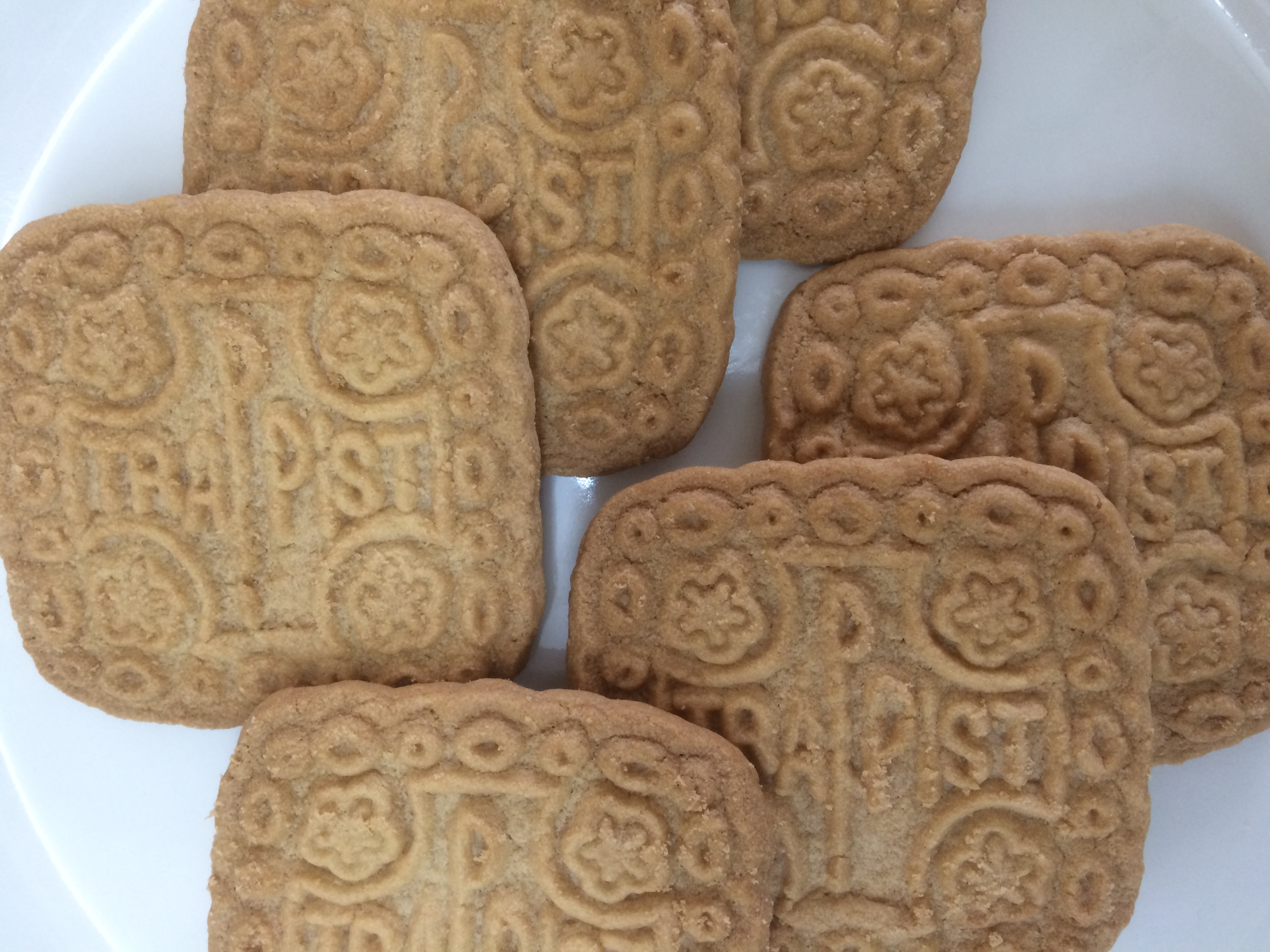 トラピスト修道院では、伝統的に「修行としての手仕事」が重んじられている。修道士自ら炊事家事、製菓、農業、養蜂などに携わっている。